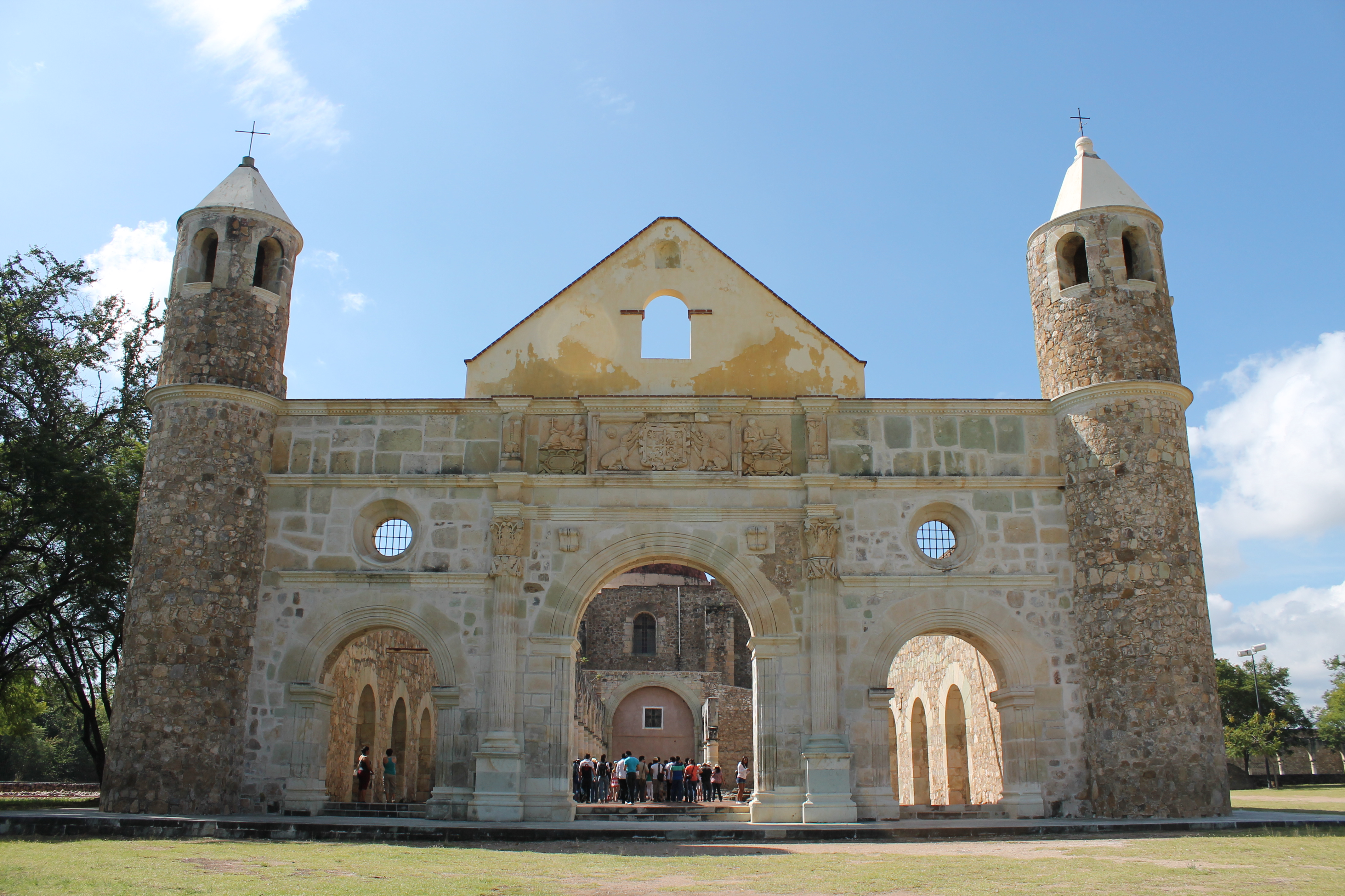 En la imagen se aprecia la fachada de la capilla abierta del Ex Convento de Santiago Apóstol.